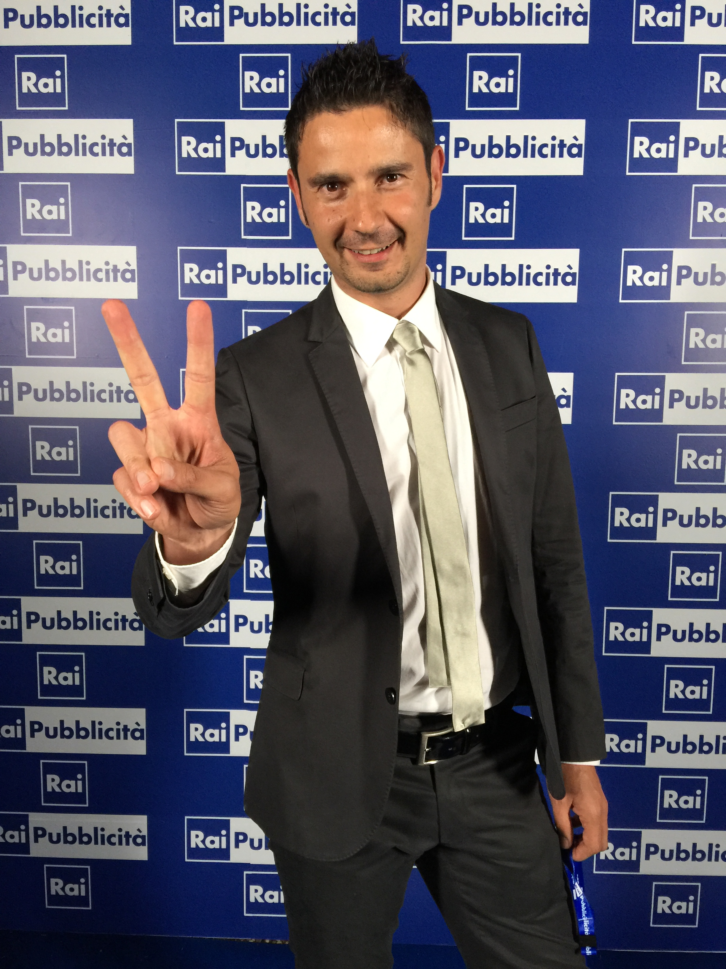 Autore e Conduttore Radio e Tv